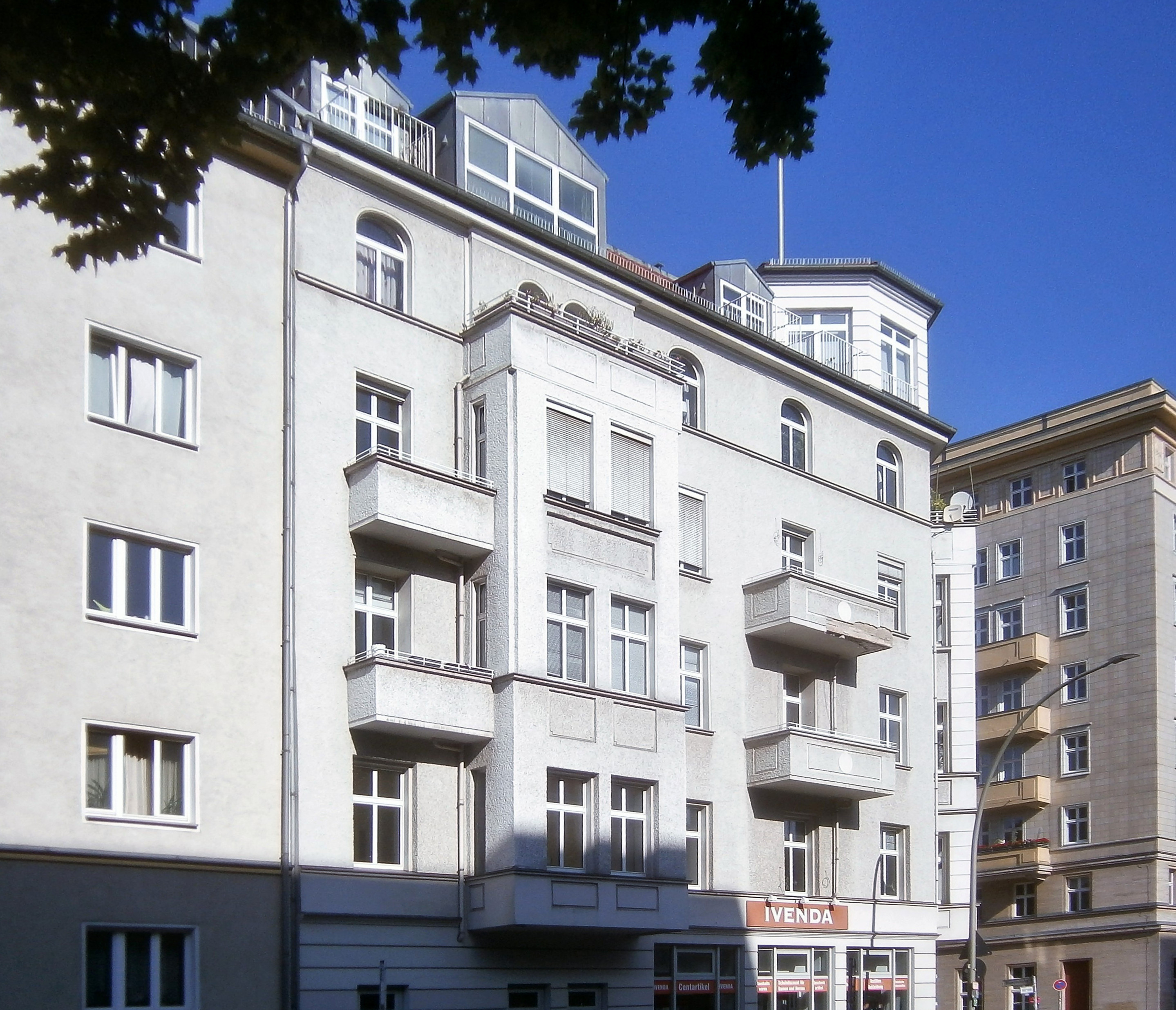 Die Andreasstraße ist eine Straße im Berliner Bezirk Friedrichshain-Kreuzberg, Ortsteil Friedrichshain. Angelegt wurde sie 1862 auf vorherigen Gartenland und 1863 benannt. Bis um 1900 waren die Grundstücke bebaut und bis 1930 wurde verdichtet. Bei Luftangriffen im Zweiten Weltkrieg wurde die Gebäude schwer getroffen. So ist die Straße seit den 1950er Jahren mit wiederhergestellten Altbauten, aber besondres durch Plattenbau-Wohnblöcke aber seit 1990 auch durch Hotel- und Bürobauten im Umfeld des Ostbahnhofs charakterieisiert. Das Bild zeigt: Ansicht des Eckhauses Blumenstraße von der Andreasstraße (da als 46a bezeichnet)